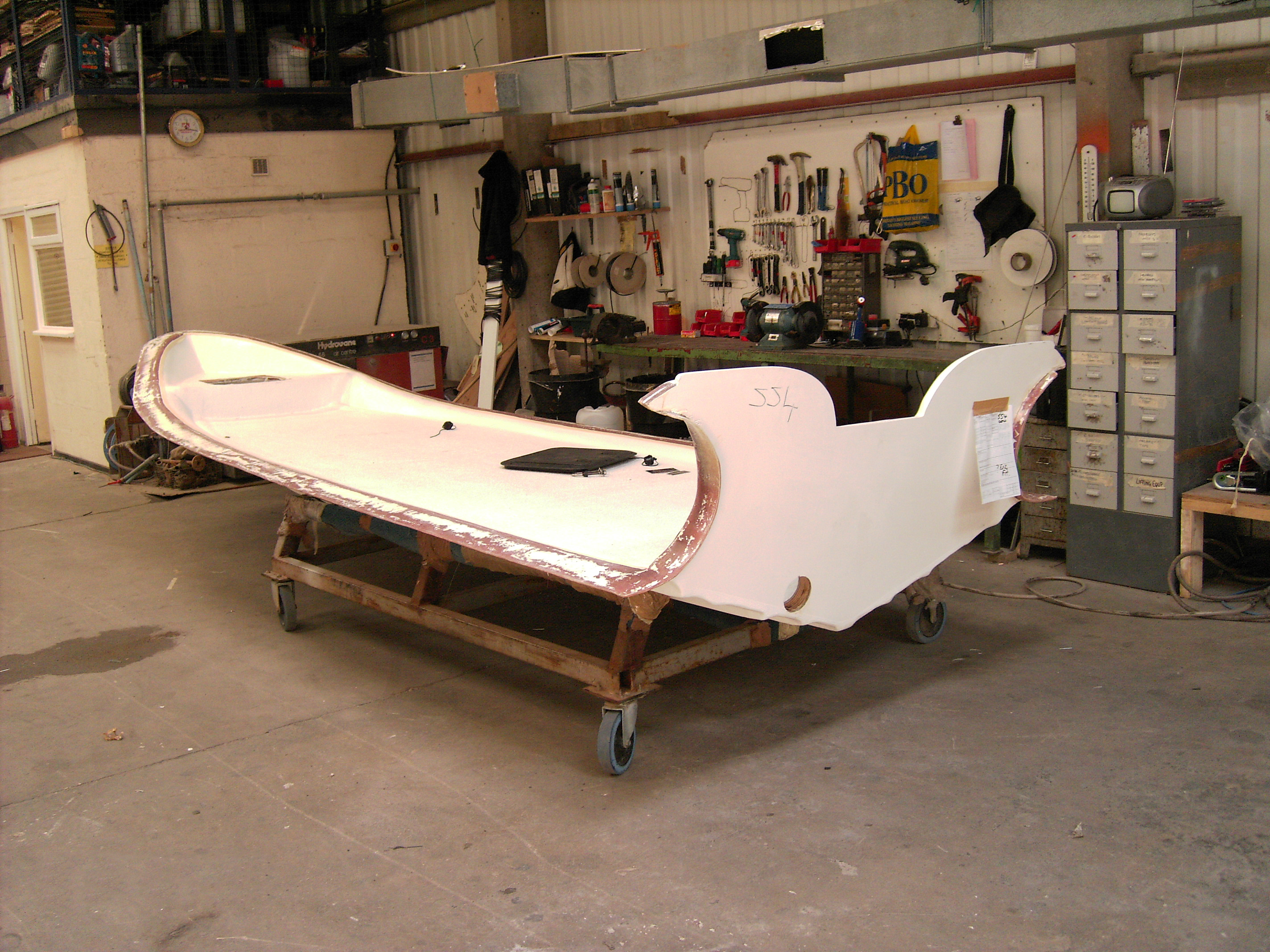 GFK Festrumpfschlauchbootrumpf ohne Schlauch, am 07.07.2005 selbst beim Hersteller HUMBER fotografiert, in einem Winkel, der die Unterwasserkonstruktion von HUMBER nicht verrät.